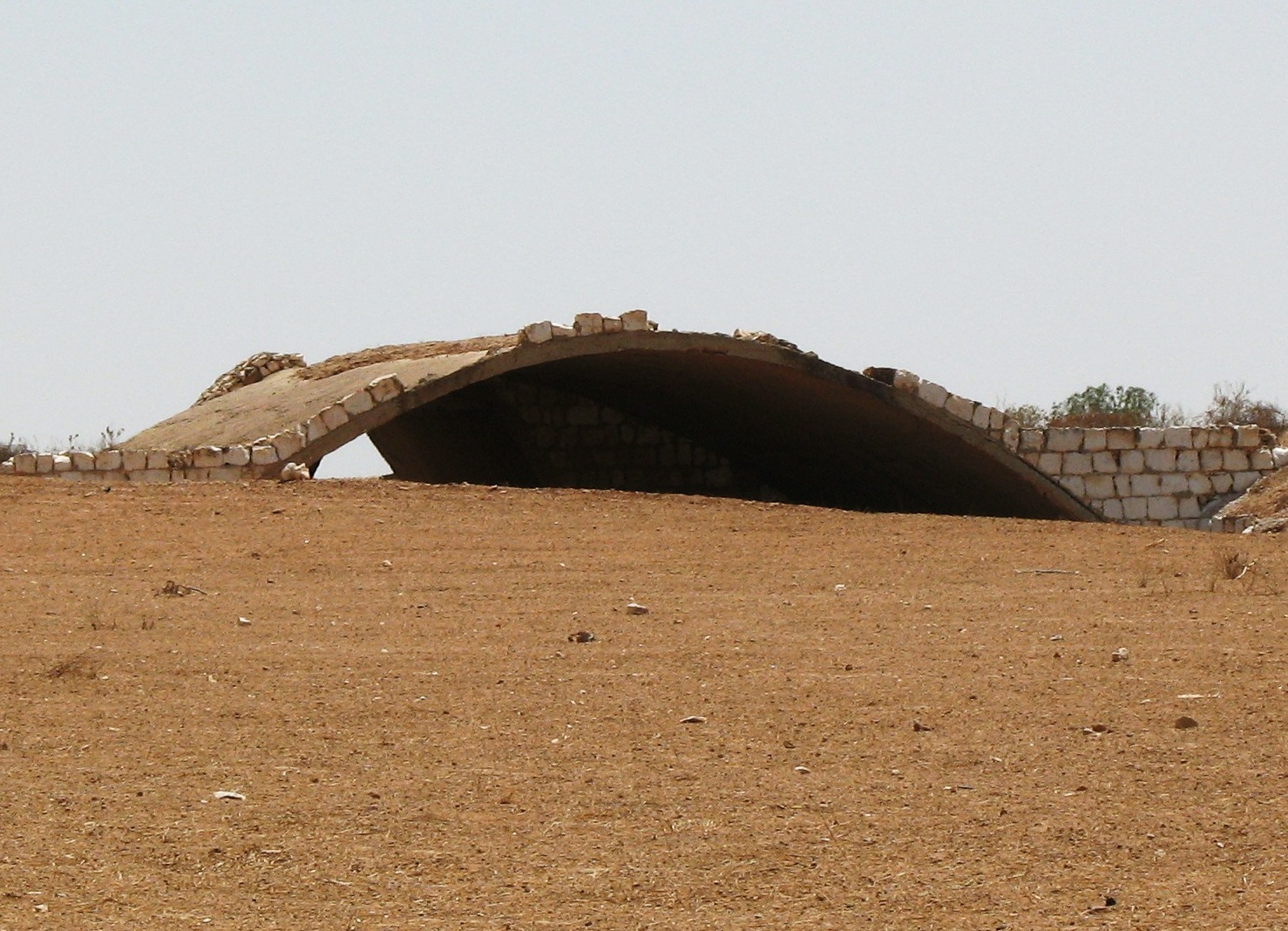 דיר תת-קרקעי, שריד מתקופת הבריטים בשדה תימן